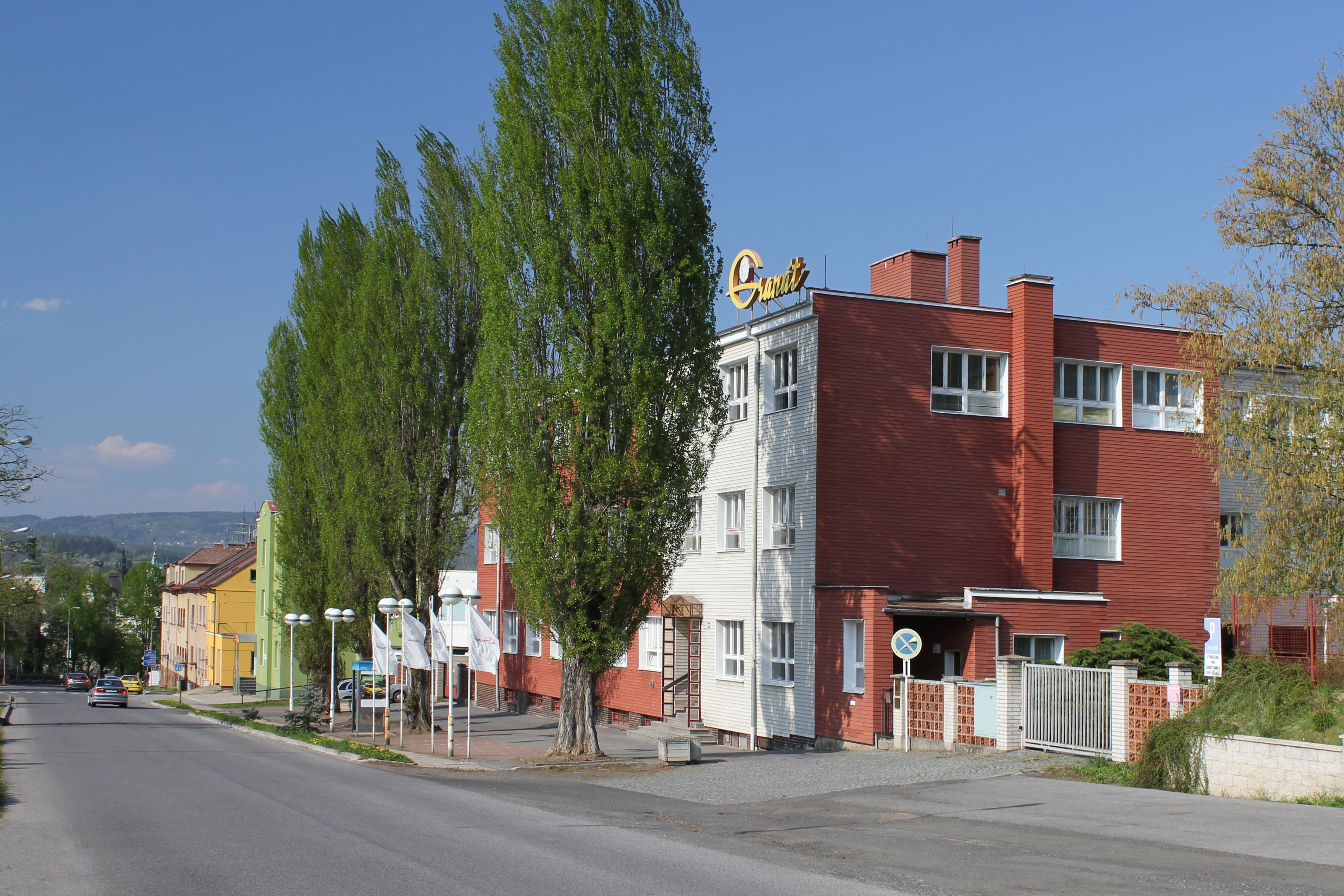 Granát Turnov, ul. Výšinka